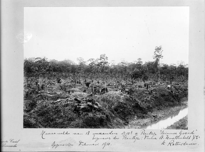 Negatief. Veld met Hevea rubberbomen